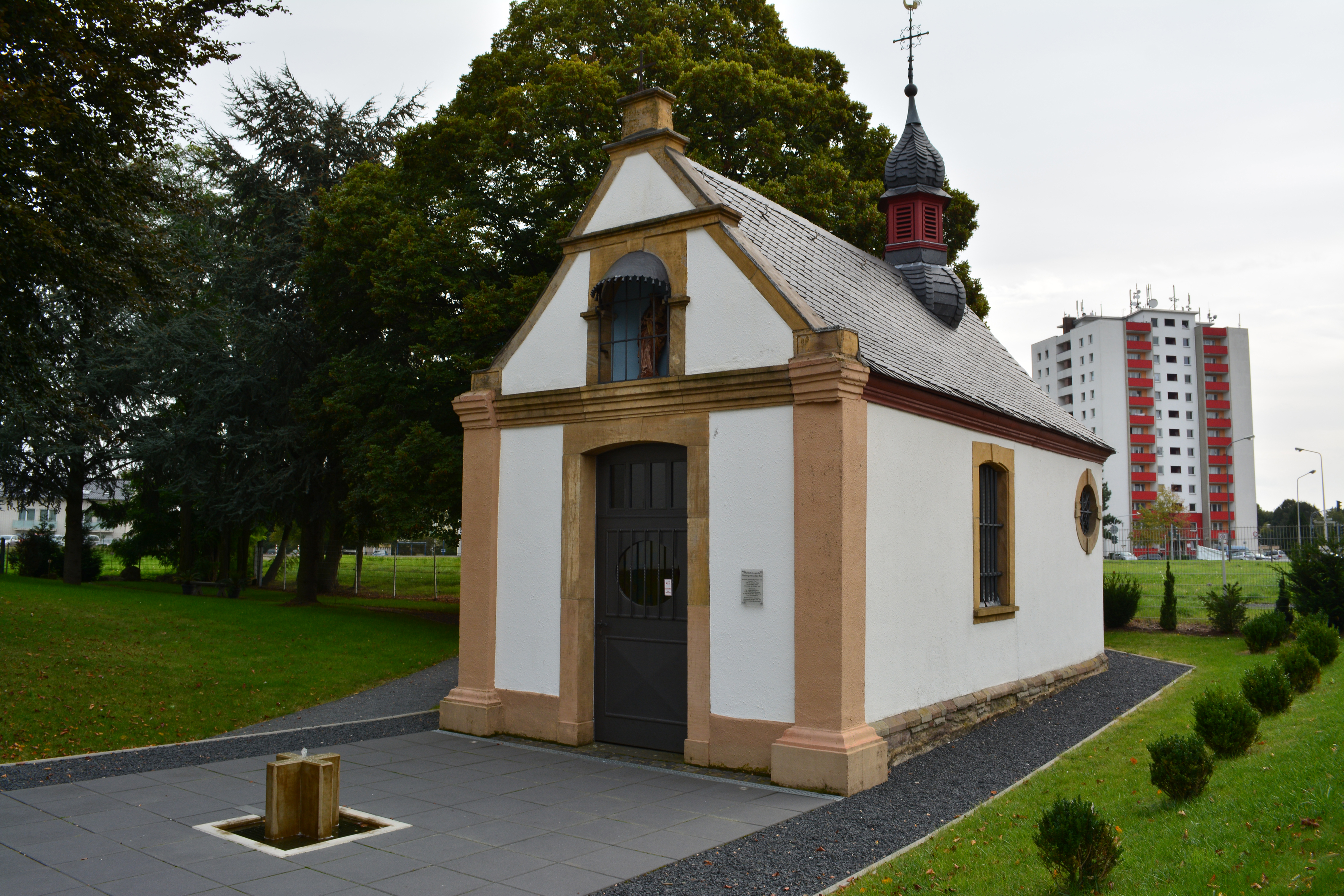 Altes Muttergotteshäuschen, Düren, Zülpicher Straße 231 This is a photograph of an architectural monument. /037